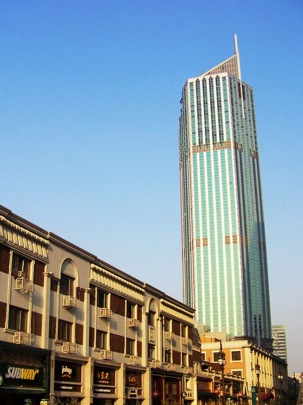 小白楼1902欧式风情街与信达广场